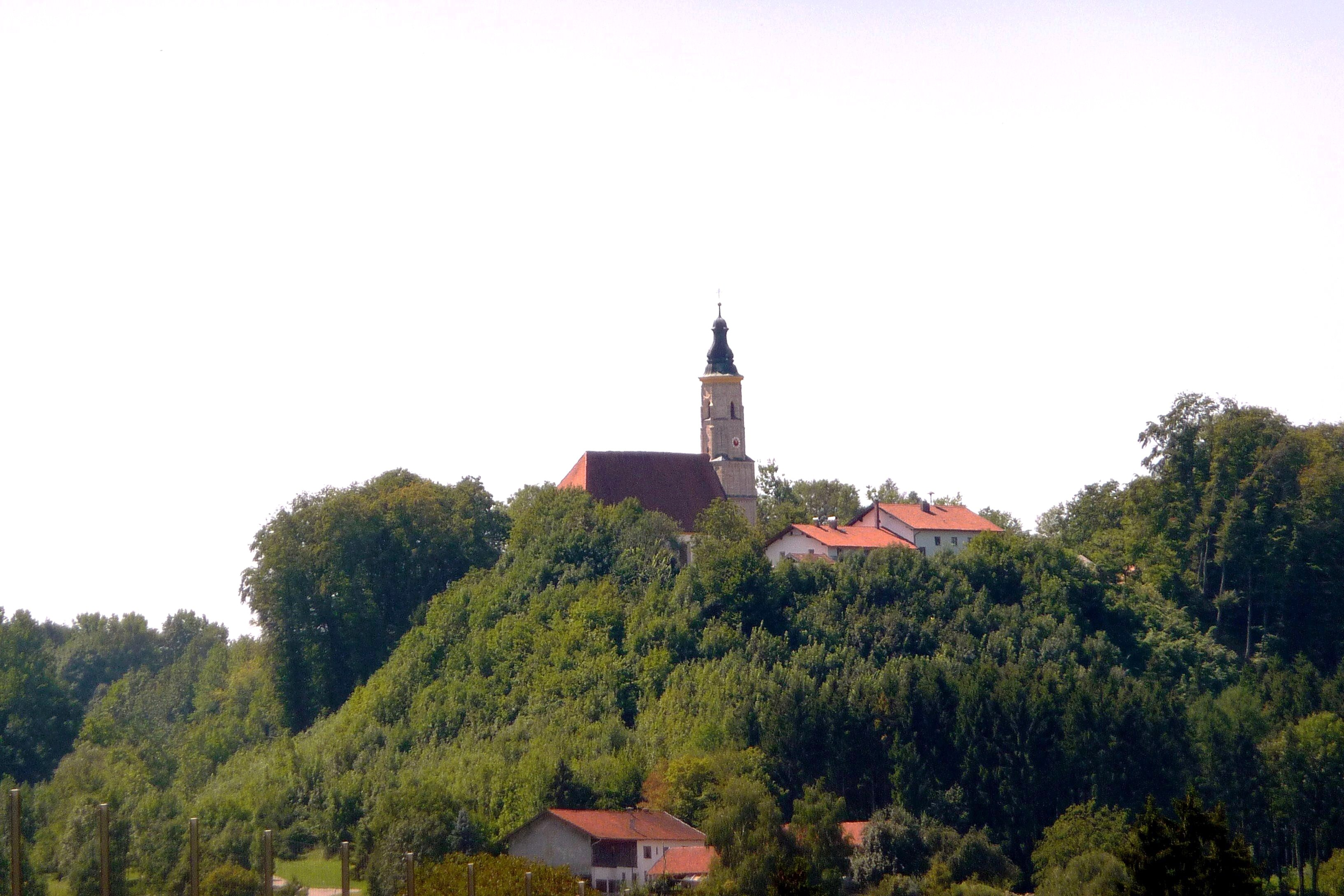 Die Pfarrkirche Maria Himmelfahrt und St. Margaretha auf dem Margarethenberg